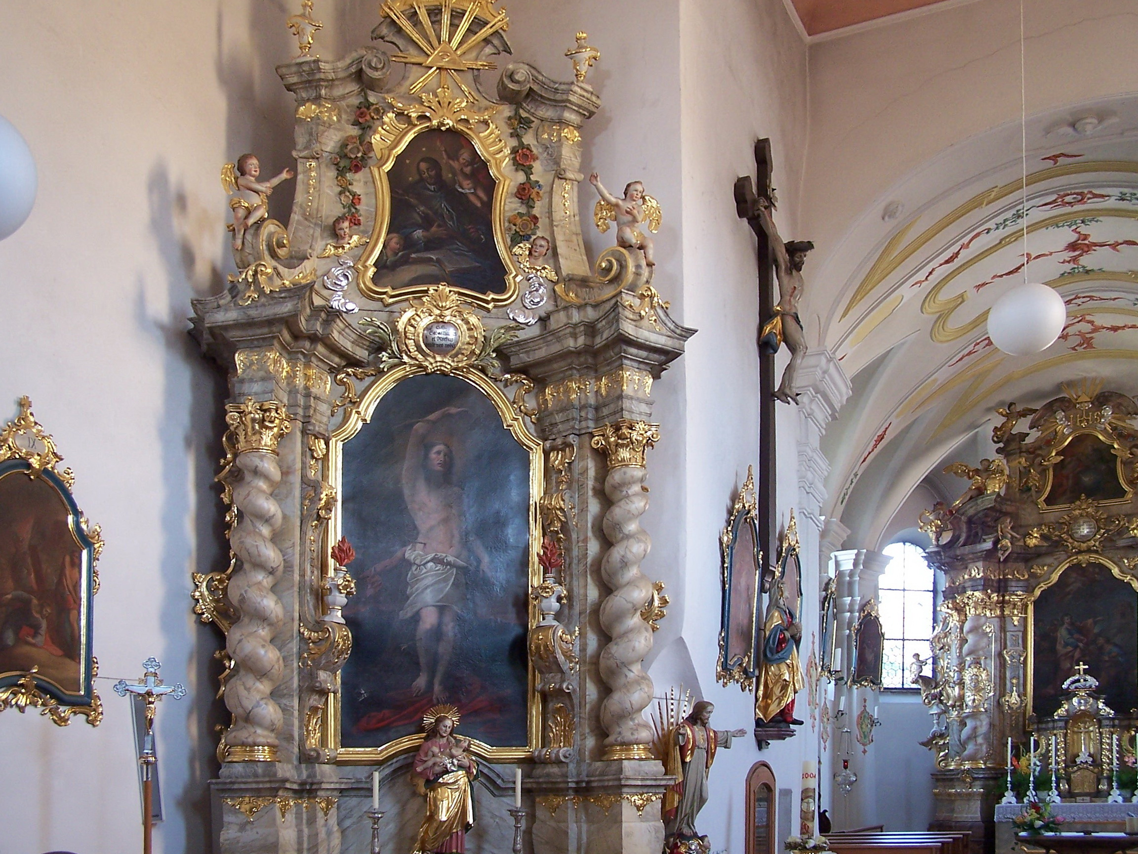 Sandsbach, Am Kirchberg 3; Am Kirchberg 2. Katholische Pfarrkirche St. Petrus. Linker Seitenaltar aus der Zeit um 1750. Altar mit zwei gewundenen Säulen. Altarblatt St. Sebastian. Auf dem Altartisch kleine Figur St. Josef.